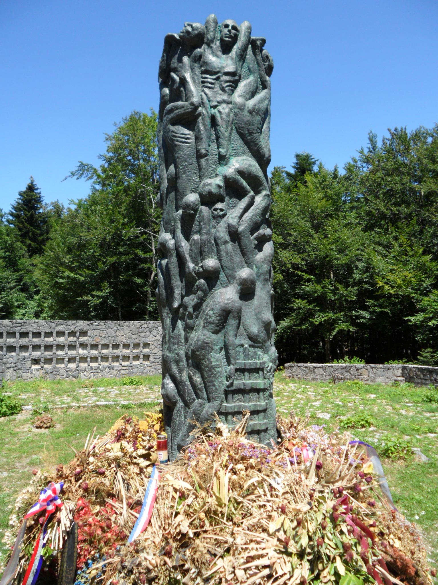 spomenik ustaškim žrtvama kod sela Trnovac